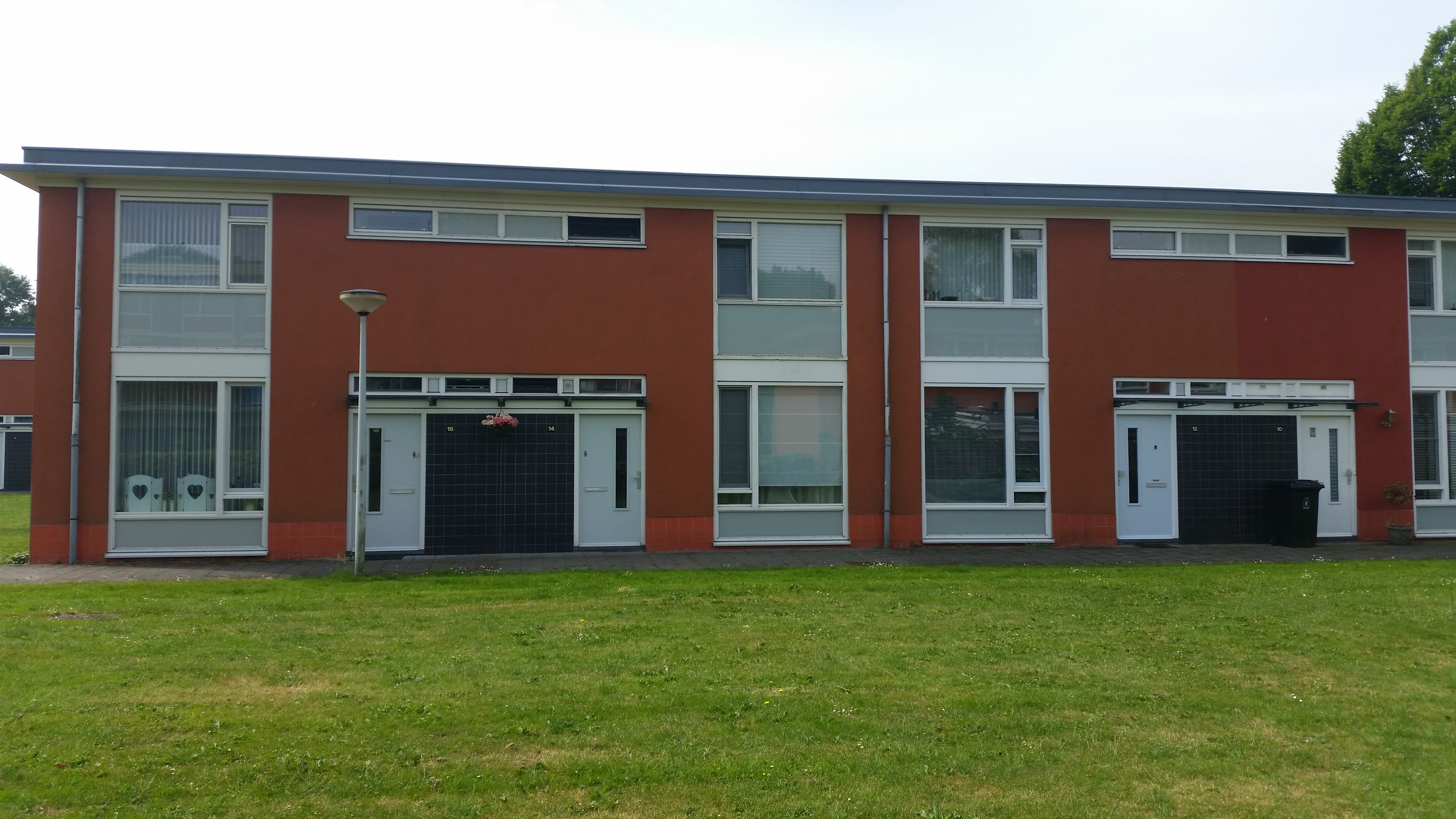 Voorgevel Willem Mulierhof 10-16, Amsterdam-Geuzenveld